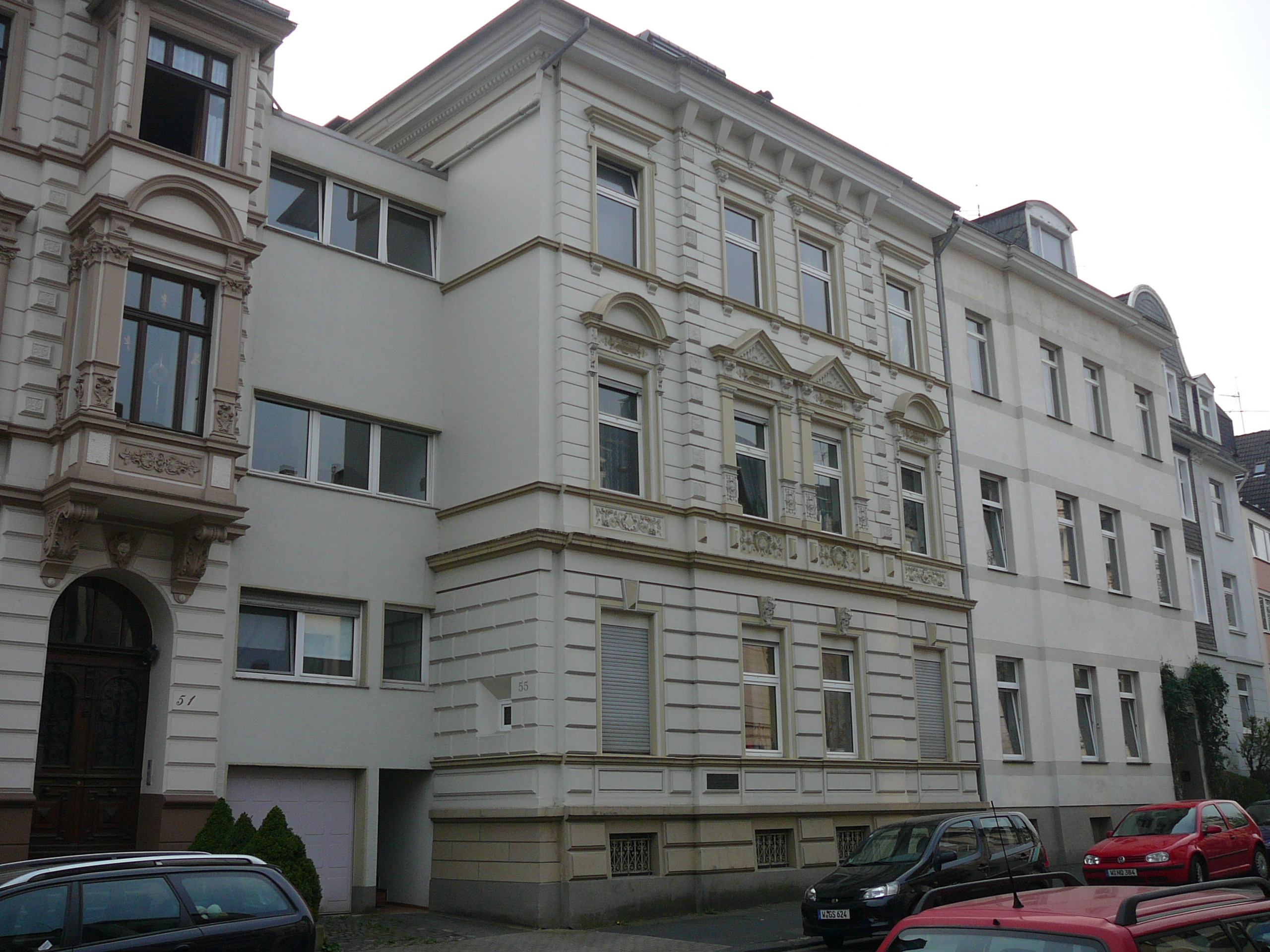 Funckstraße, Wuppertal